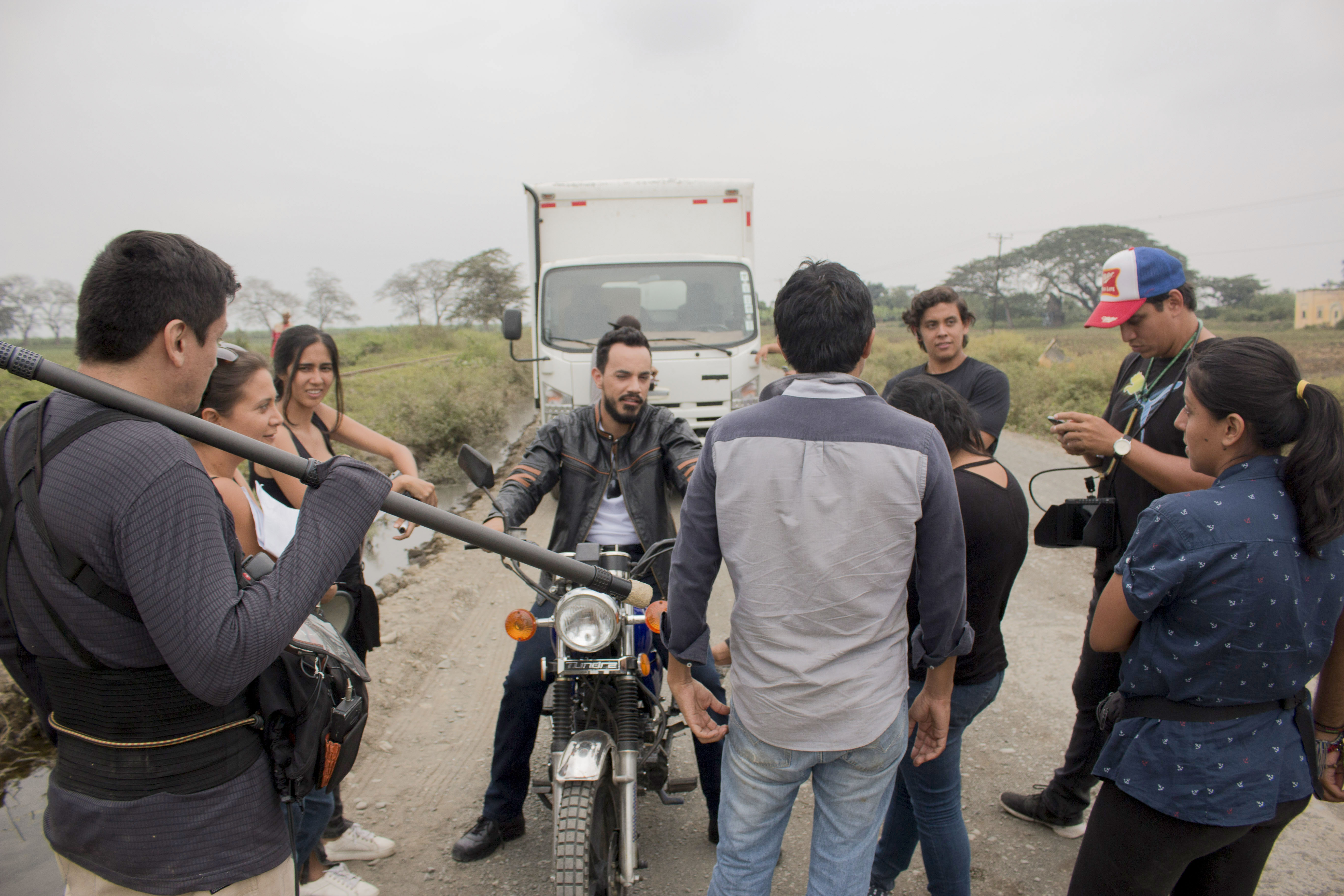 Durante el rodaje de la película Minuto Final, Luis Avilés dando indicaciones al elenco y equipo de producción de la película.